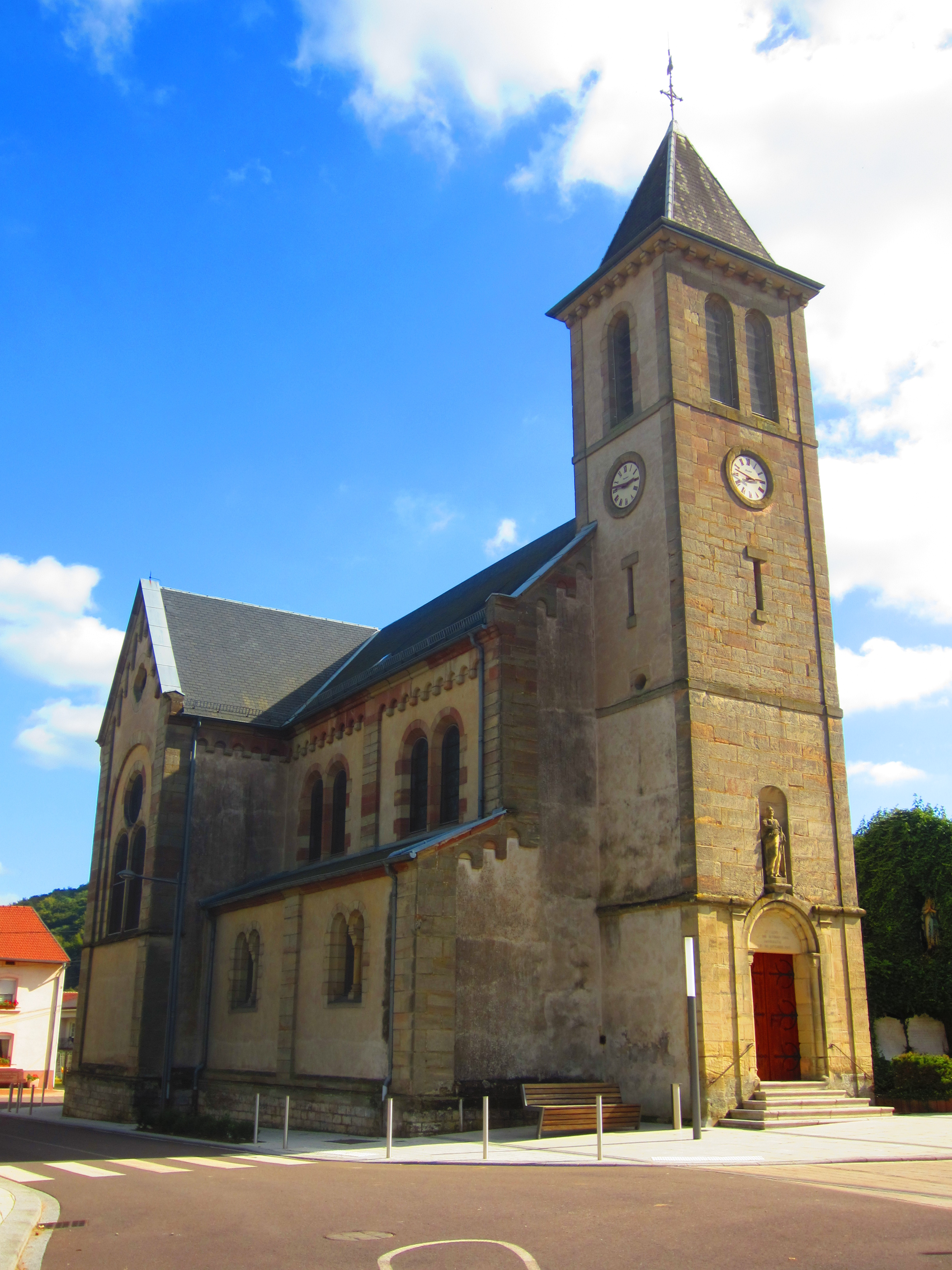 Eglise de Dalem